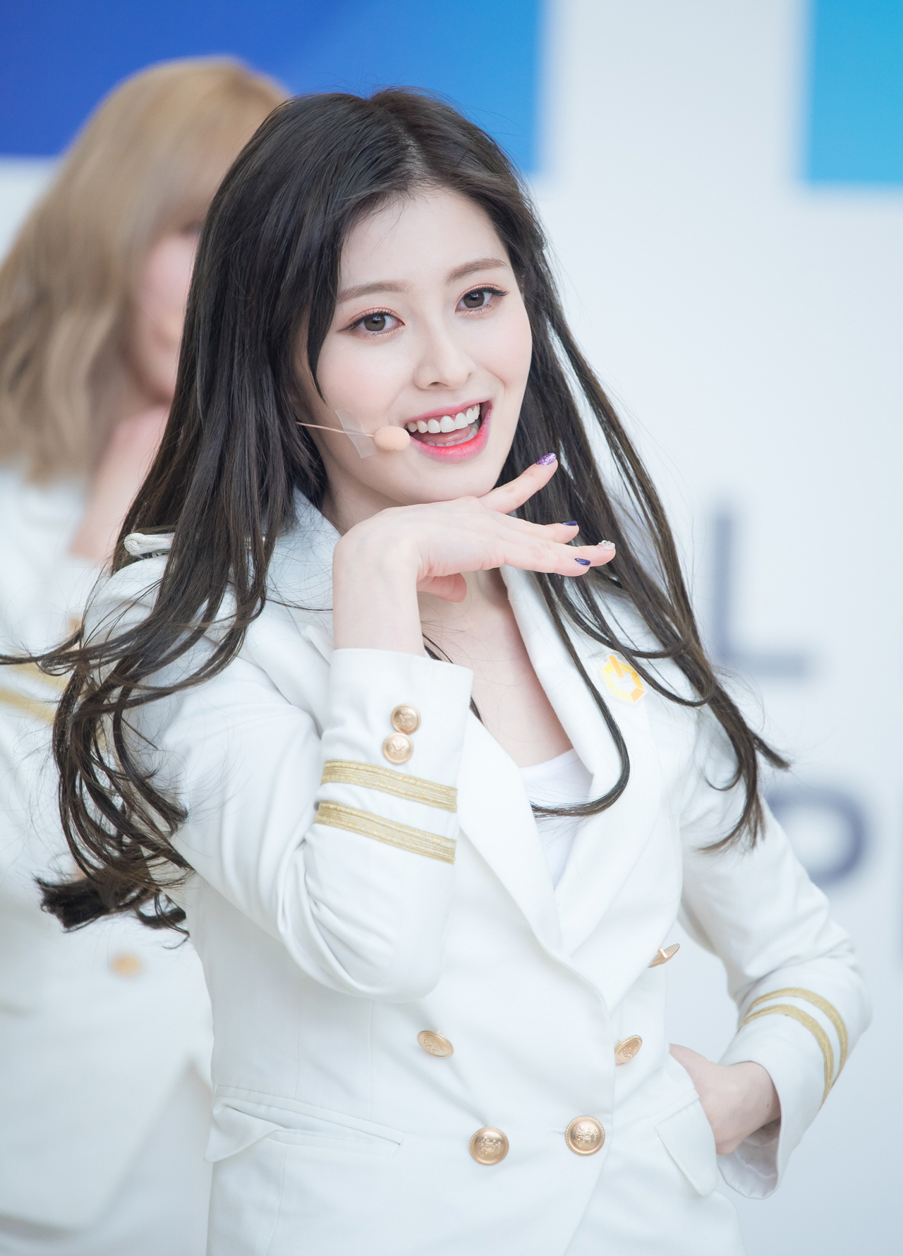 180211 더유닛 유닛G